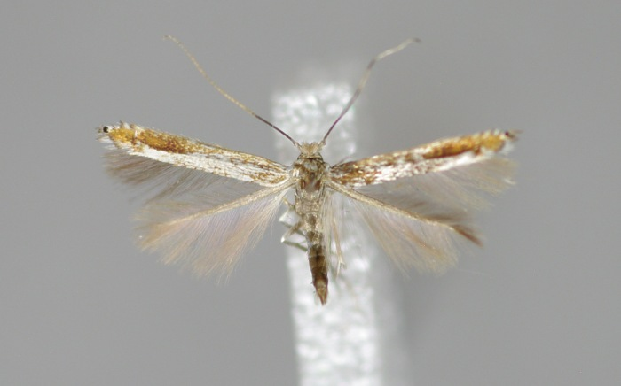 Lyonetia clerkella